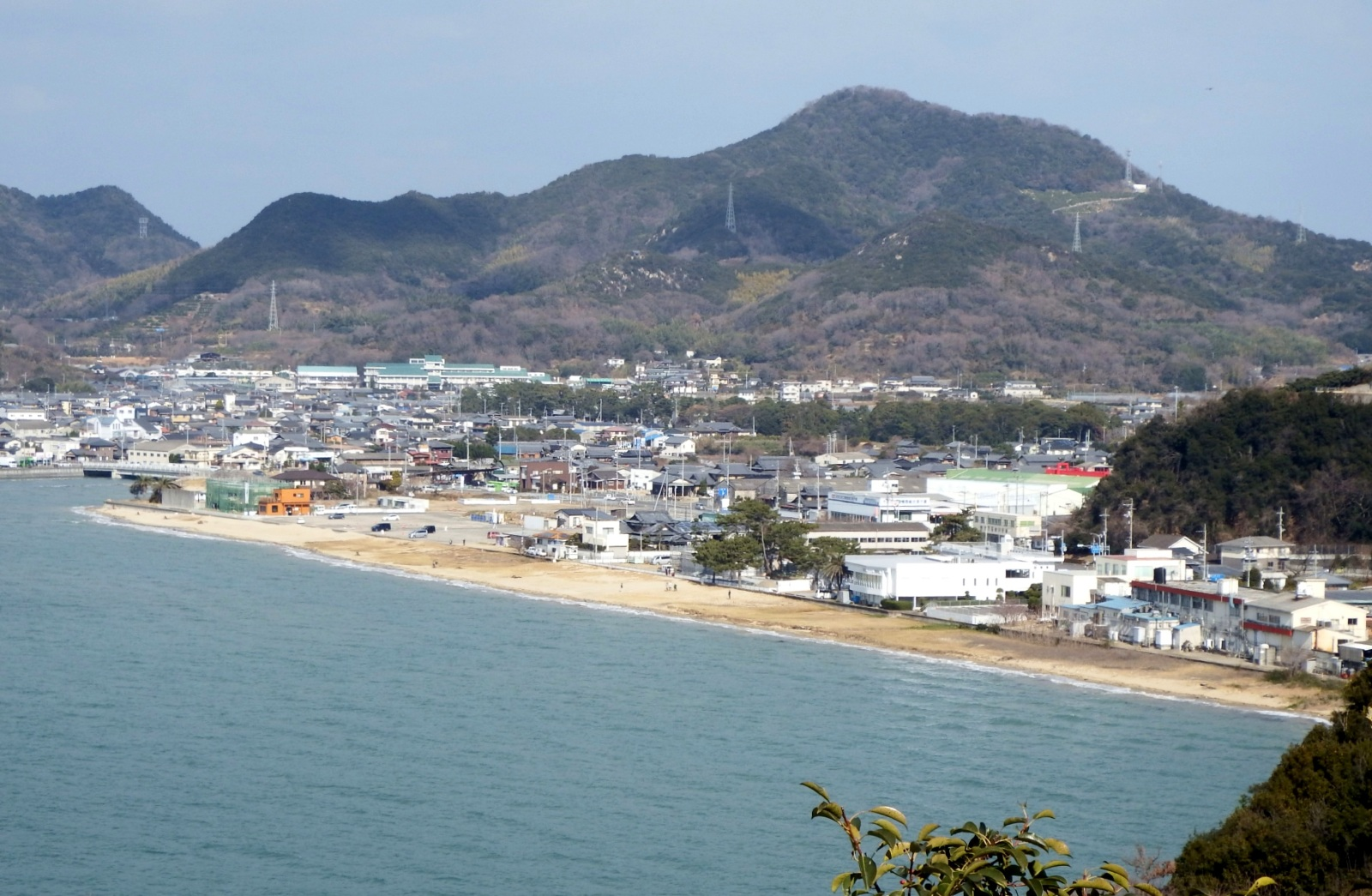 父母ヶ浜の全景